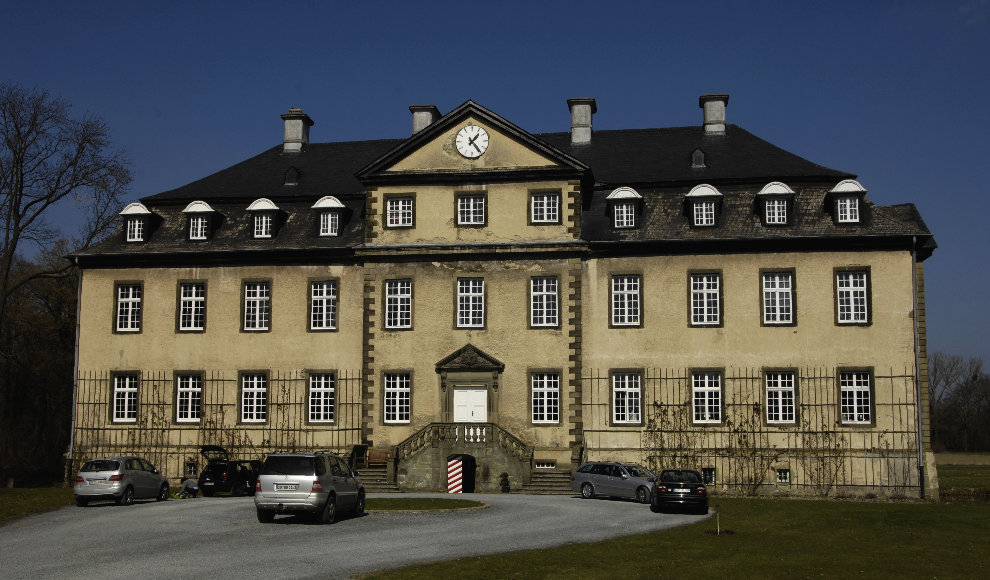 Schloss Herringhausen unweit der Lippe